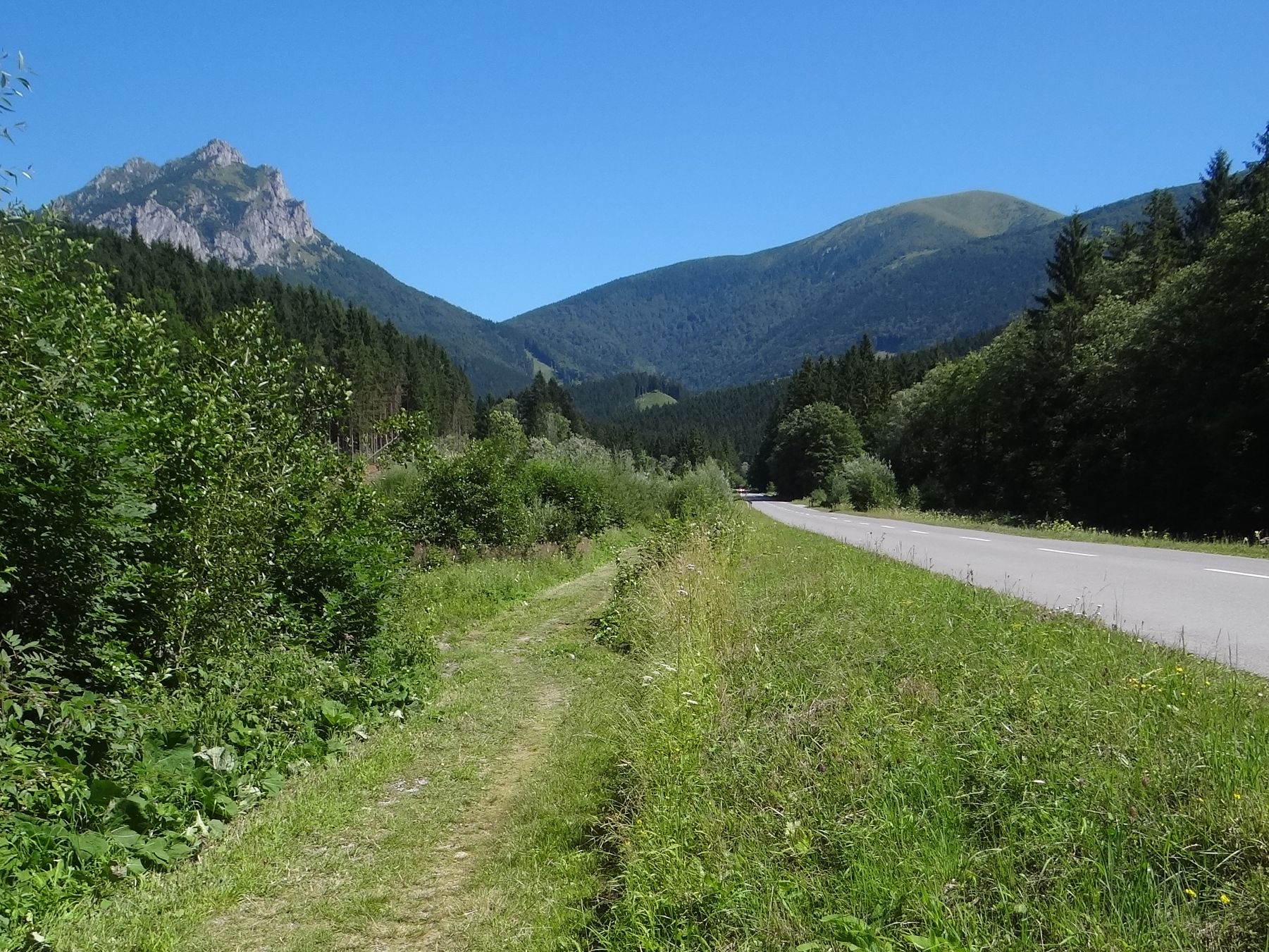 Nová dolina, Veľký Rozsutec i Stoh